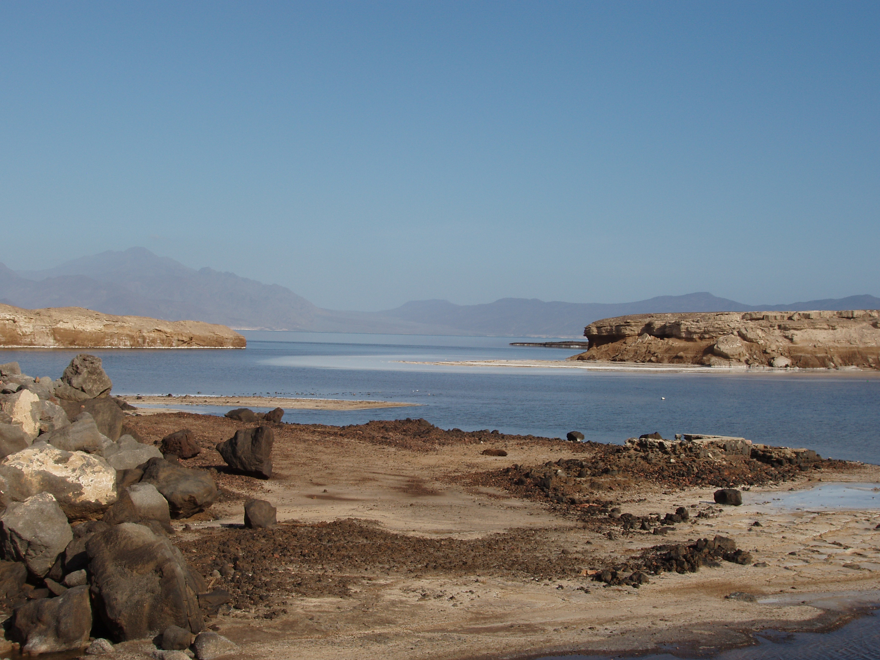 Lake Assal, Djibouti